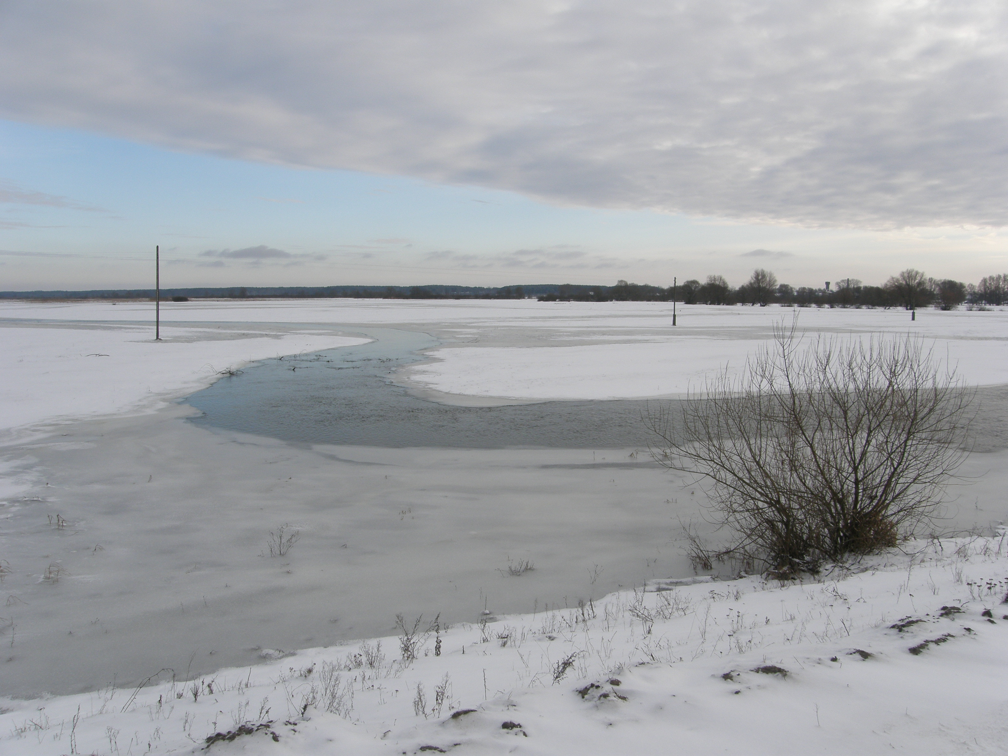 Der Stochid im Winter nördlich von Lutzk